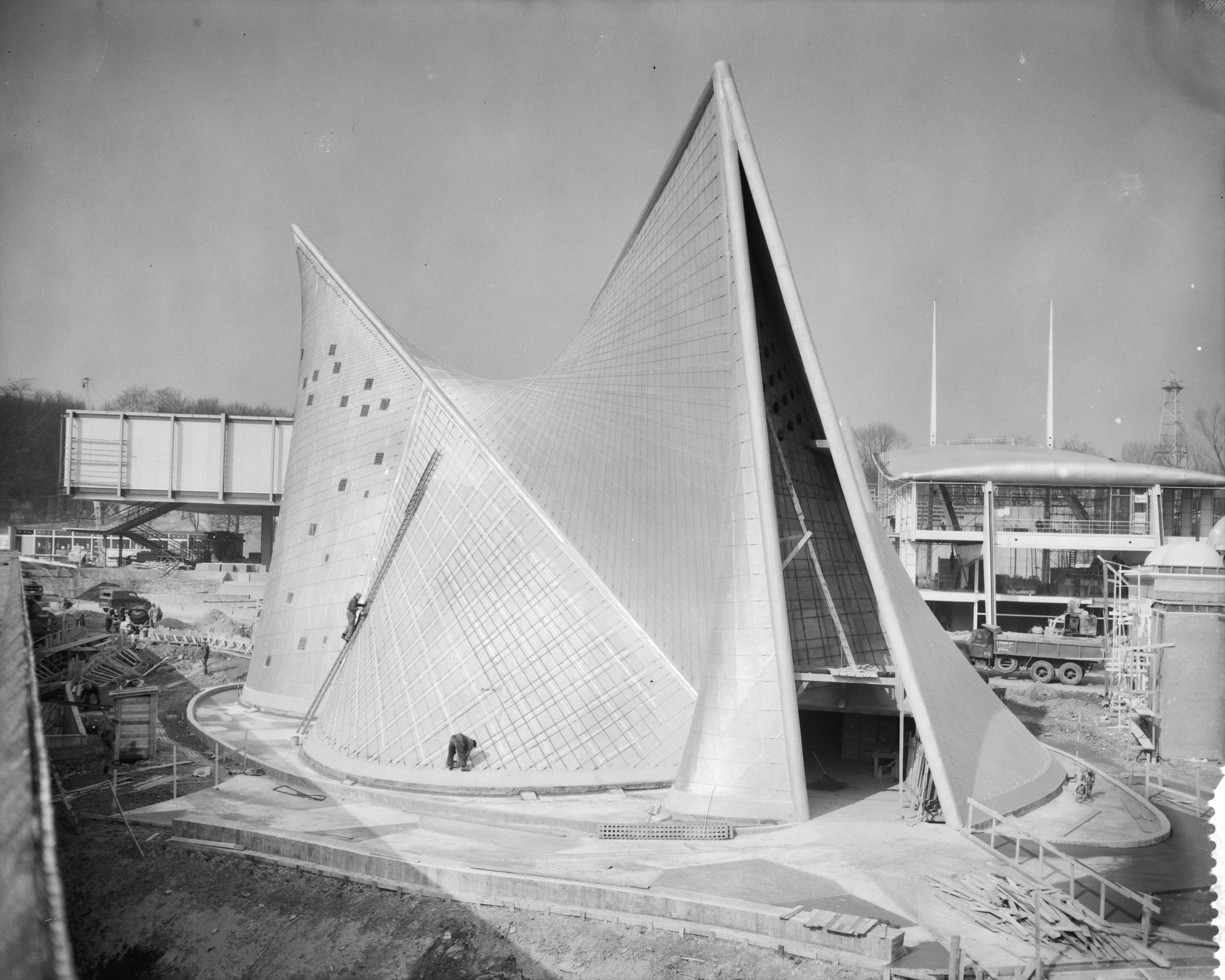 Collectie / Archief : Fotocollectie Anefo Reportage / Serie : [ onbekend ] Beschrijving : Opbouw wereldtentoonstelling in Brussel, Philipspaviljoen Datum : 20 maart 1958 Locatie : Brussel Trefwoorden : OPBOUW, WERELDTENTOONSTELLING Instellingsnaam : Philips Fotograaf : Behrens, Herbert / Anefo Auteursrechthebbende : Nationaal Archief Materiaalsoort : Negatief (zwart/wit) Nummer archiefinventaris : bekijk toegang 2.24.01.04 Bestanddeelnummer : 909-4204